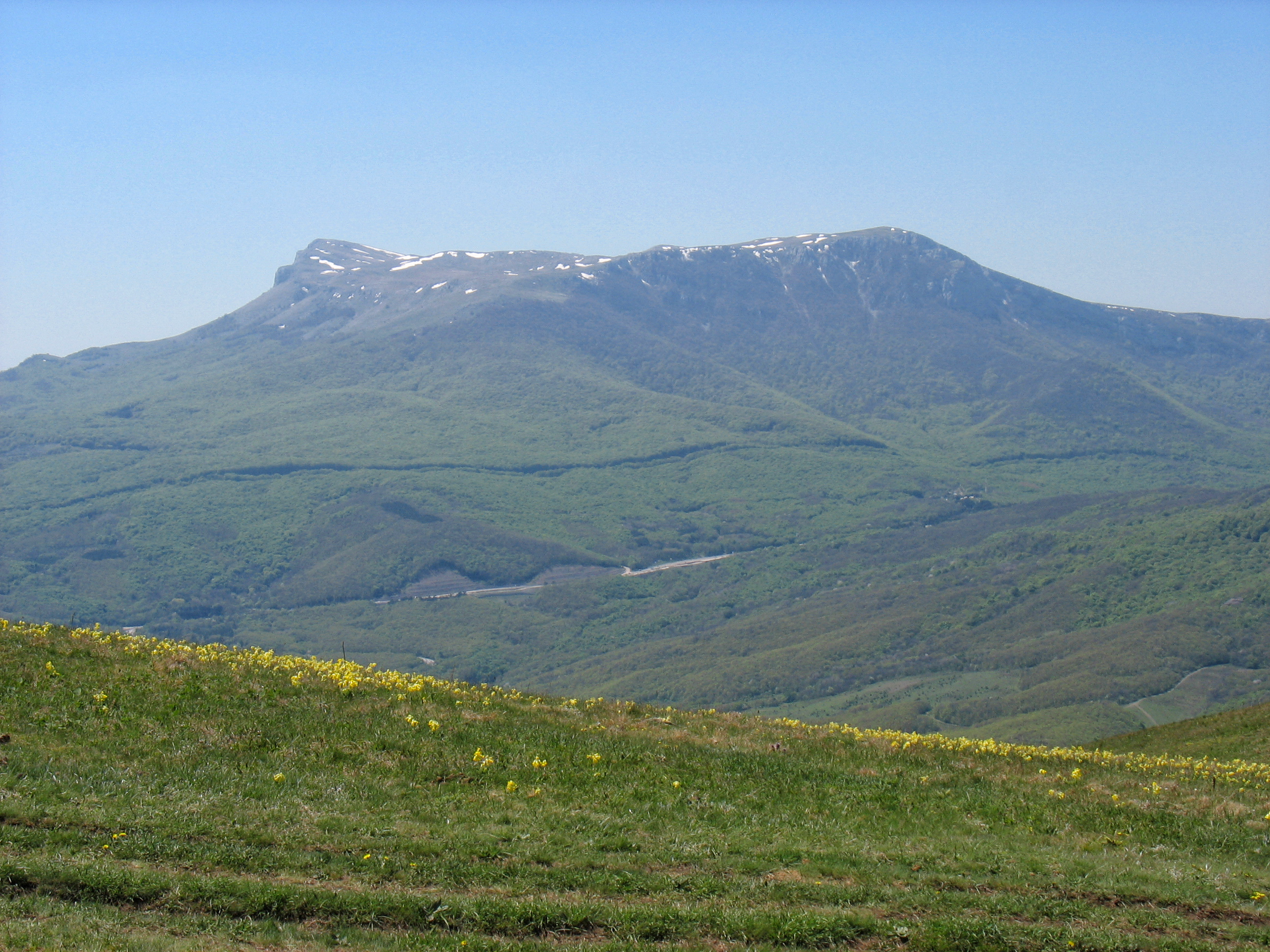 Яйла Чатирдага з Демерджи